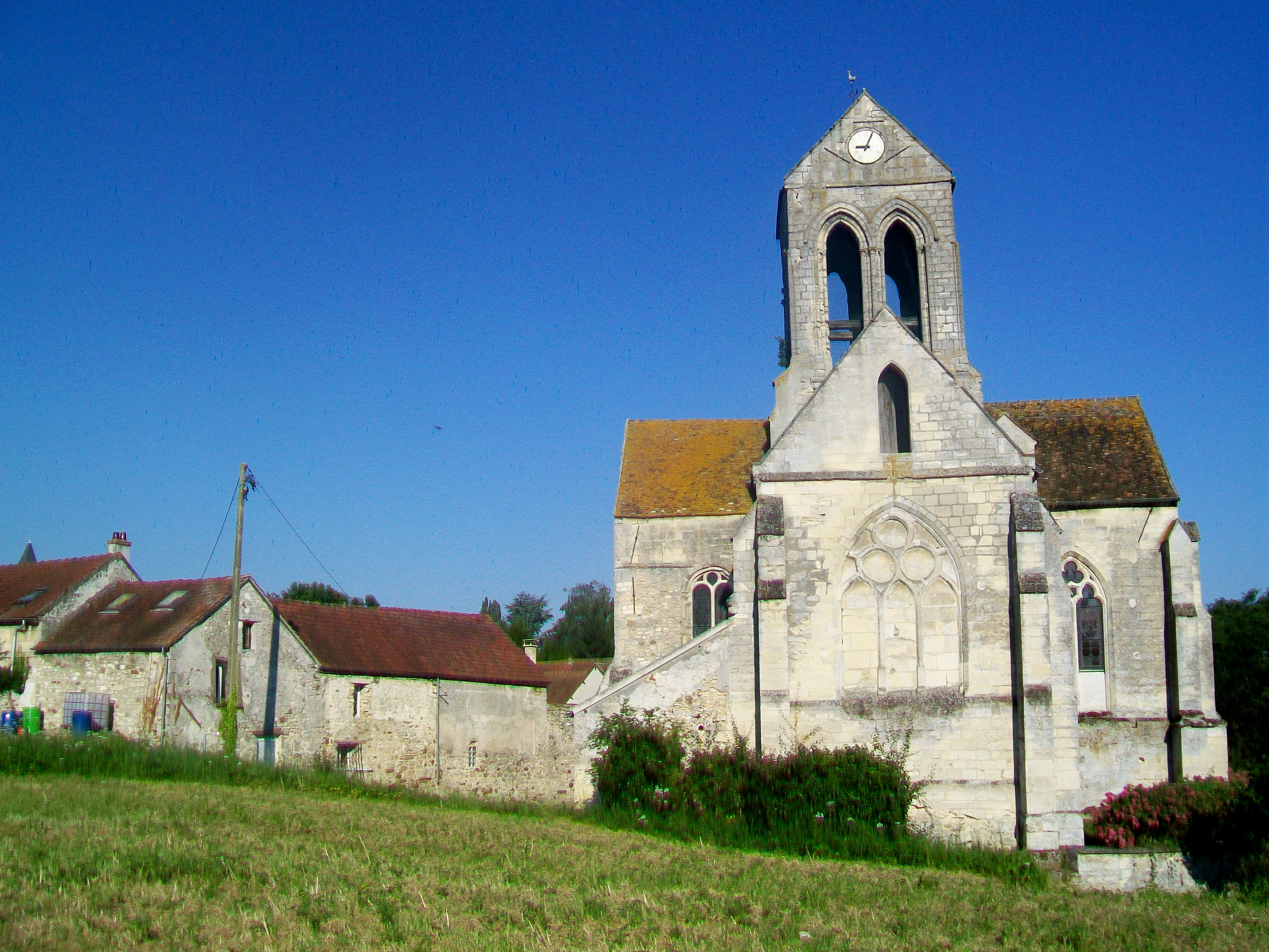 Le chevet et le clocher, depuis l'est.